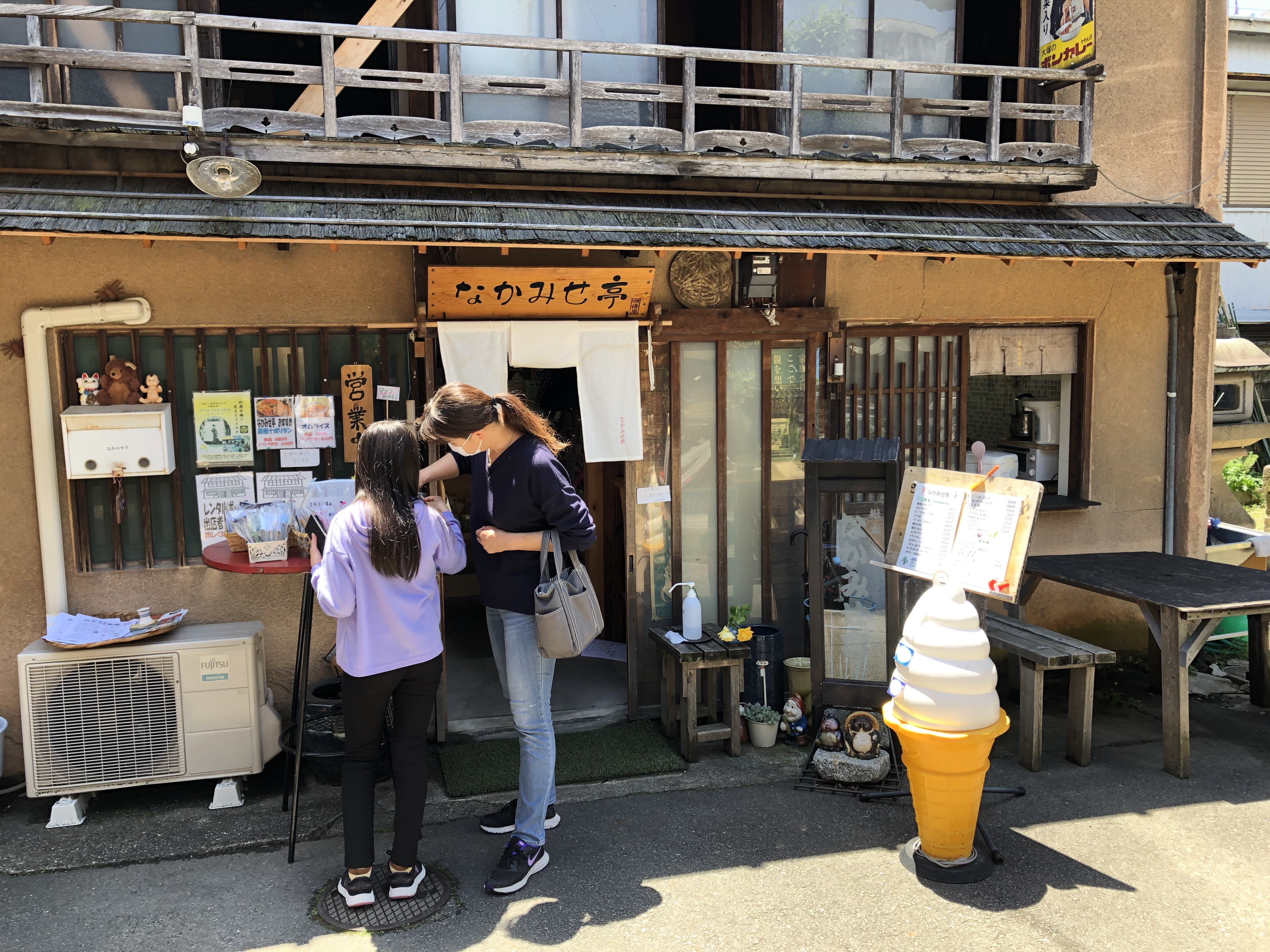 松本なかみせ亭（岡崎市松本町）